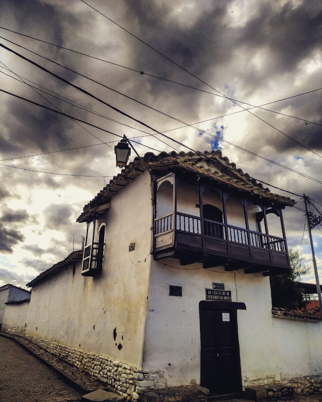 Casa de Moto Mendez